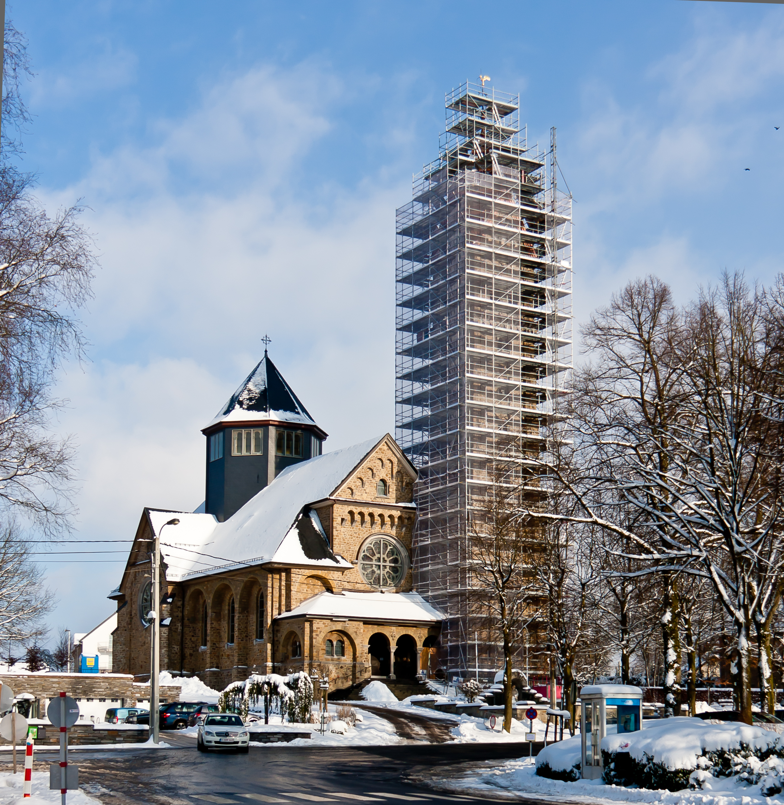 Église Saint-Étienne, Bütgenbach